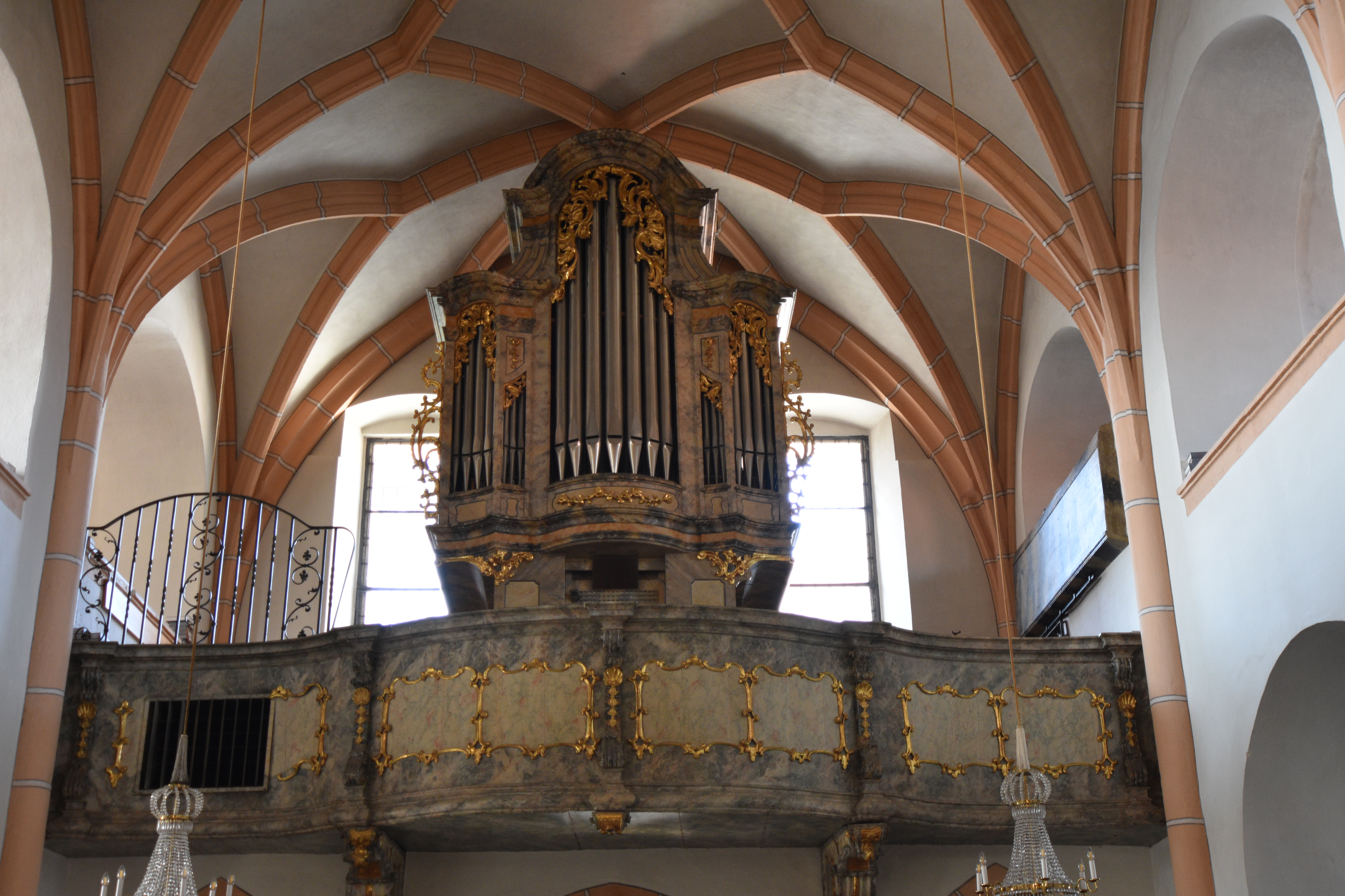 Pfarrkirche Straden - Interior